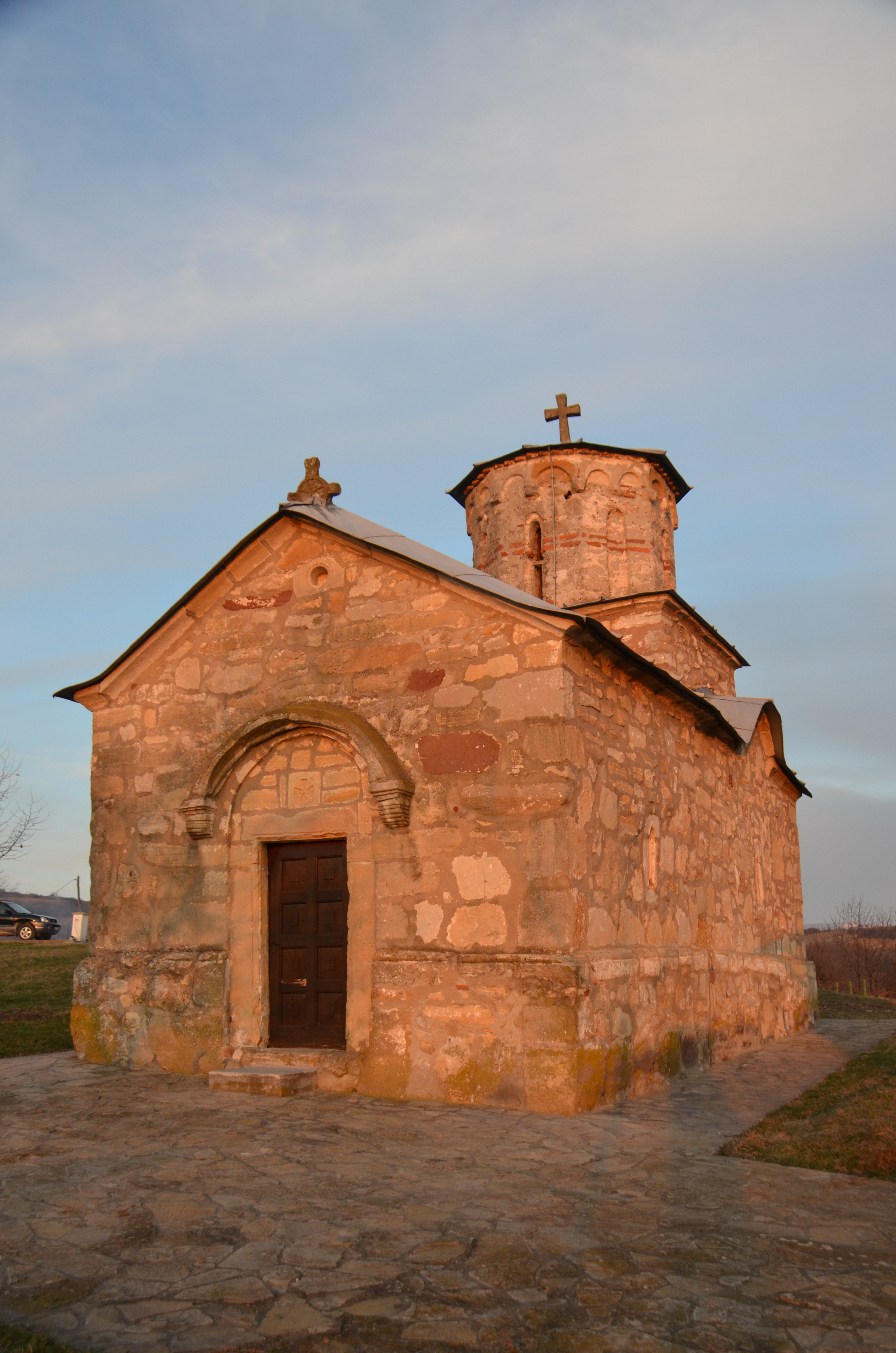 Манастир Рођења Пресвете Богородице - Бела црква, село Бељајка, Општина Деспотовац, Поморавски округ